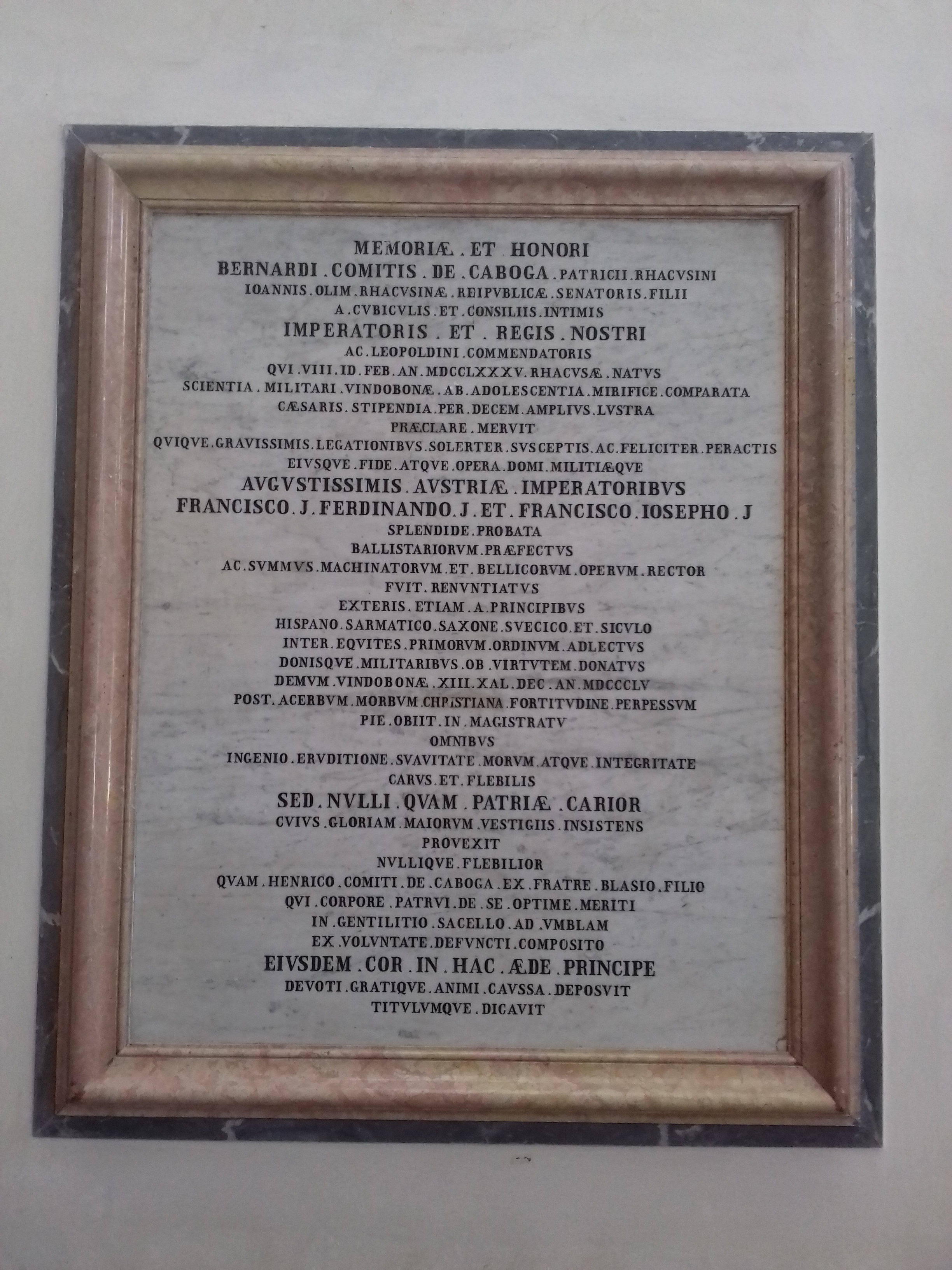 Spomen ploča Brni Kabužiću u katedrali